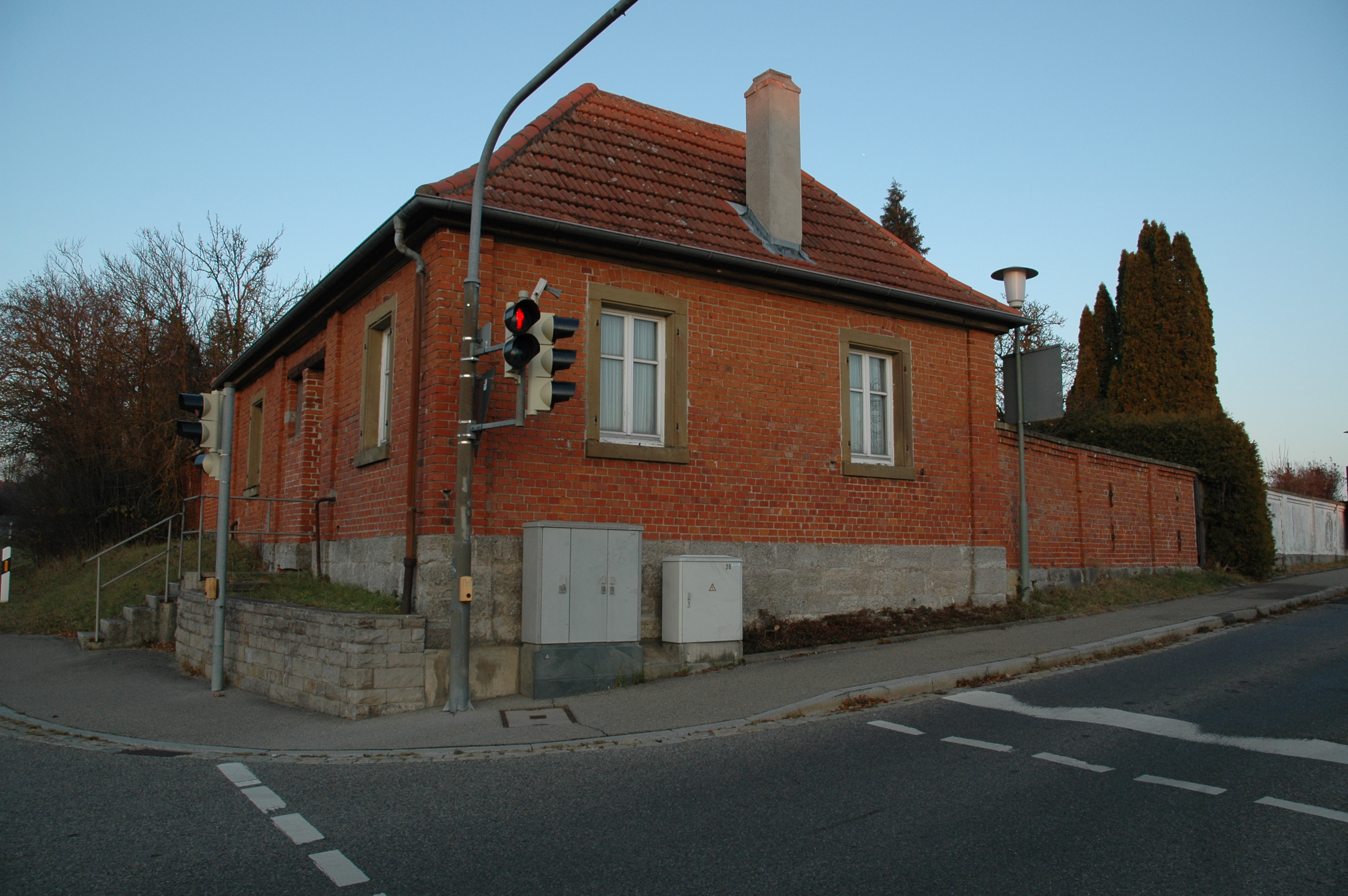 Neuer Jüdischer Friedhof in Rothenburg ob der Tauber: Taharahaus im Halbprofil, Ecke Wiesenstraße / Würzburger Straße